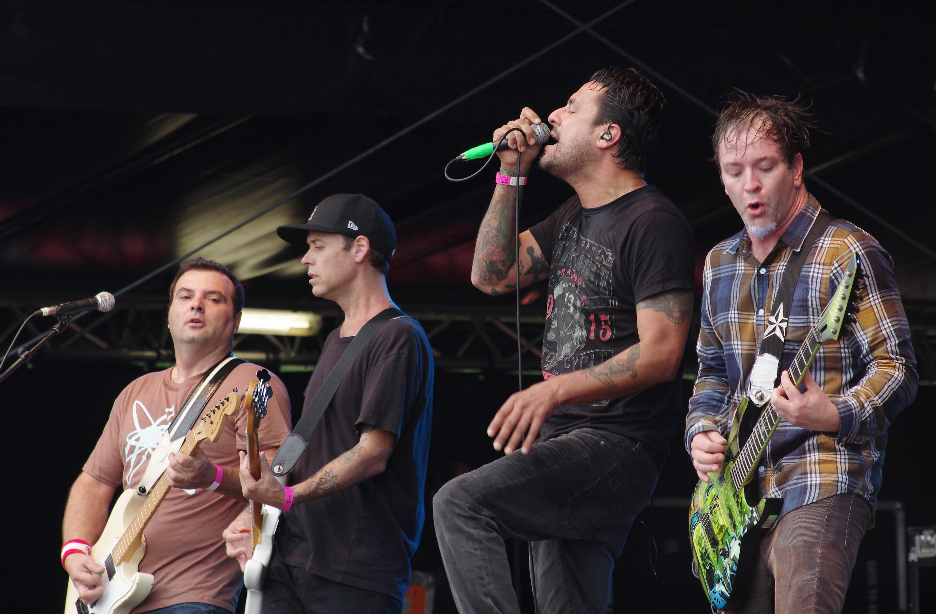 Strung Out beim Ruhrpott Rodeo 2013 in Hünxe. Rob Ramos (Guitar), Chris Aiken (Bass), Jason Cruz (Vocals), Jake Kiley (Guitar)